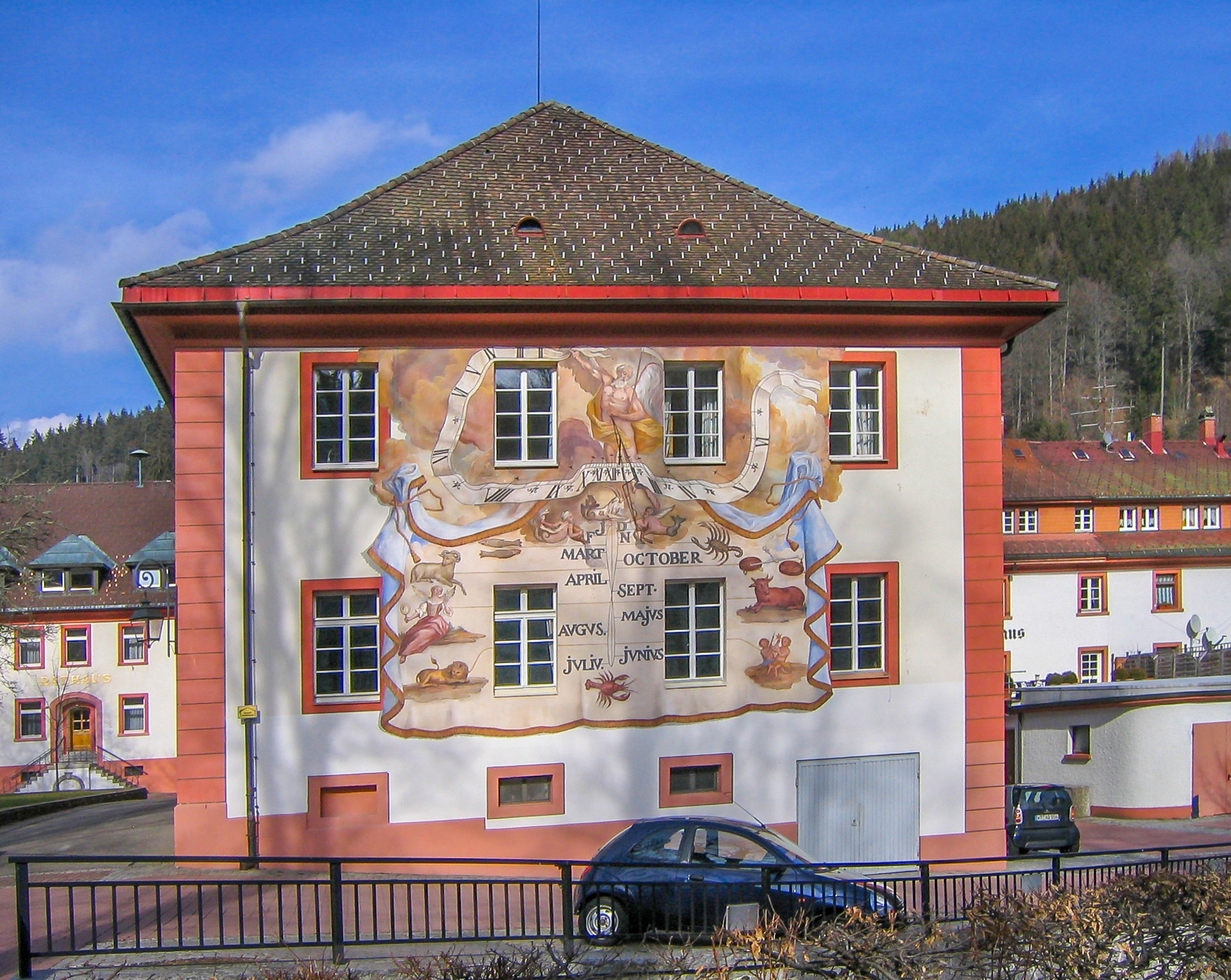 Sonnenuhr an einem Gebäude nahe dem Dom von St. Blasien. Genutzt wird das Gebäude durch das Amtsgericht St. Blasien.